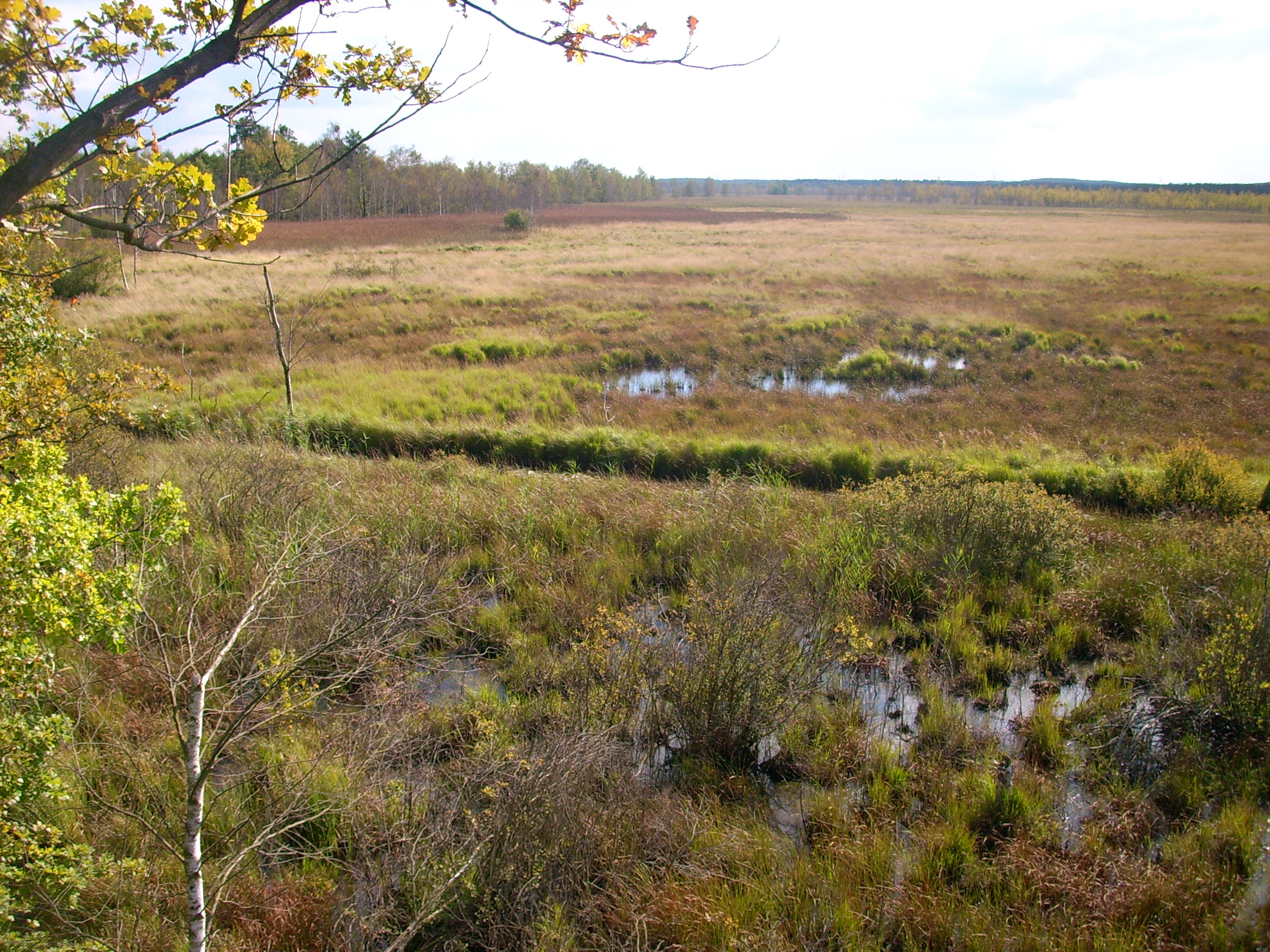 Dubringer Moor bei Wittichenau